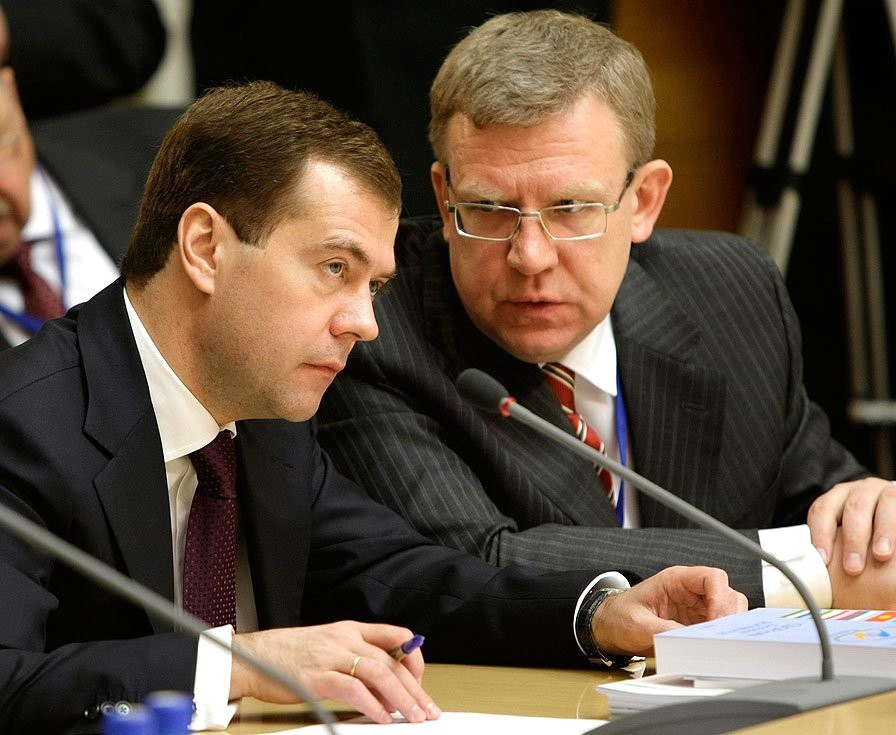 На заседании Межгосударственного совета ЕврАзЭС и Межгоссовета сообщества в качестве высшего органа Таможенного союза. С Заместителем Председателя Правительства – Министром финансов Алексеем Кудриным.